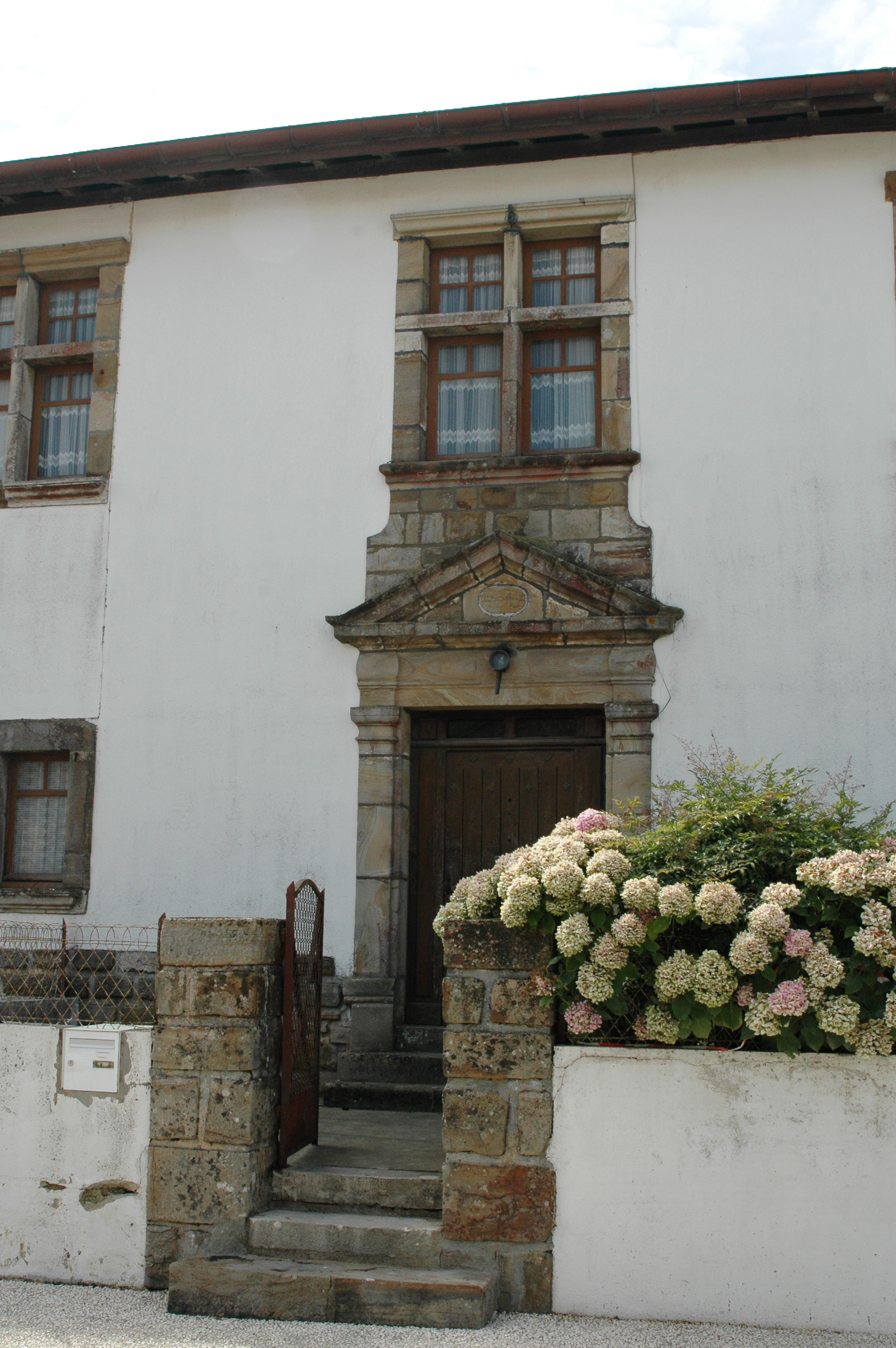 Orègue, porte de l'église Saint-Jean-Baptiste